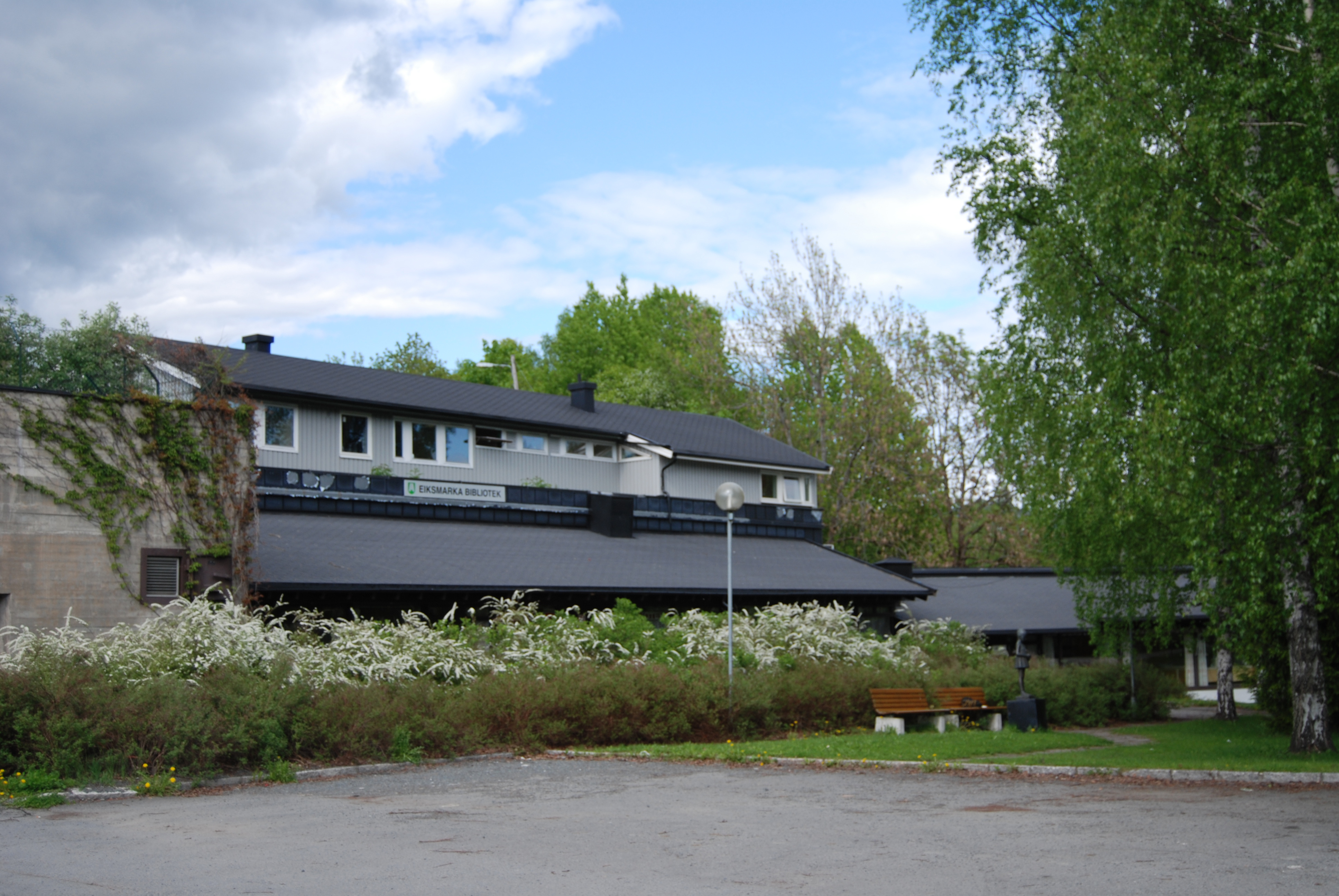 Eiksmarka Biblitek (Oslo) 25. 05.2009 r.